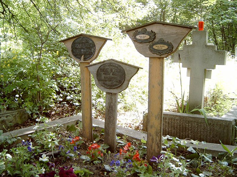 Vadnay Dezső (Szatmárnémeti, 1894. június 2. – Budapest, 1977. október 26.) újságíró, ifjúsági író és családjának sírja Budapesten. Új köztemető: 155-1-123/124.